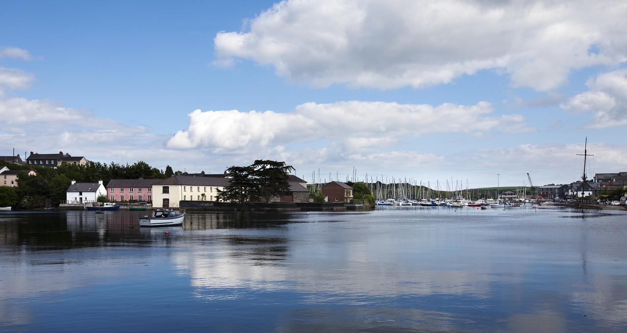 kinsale